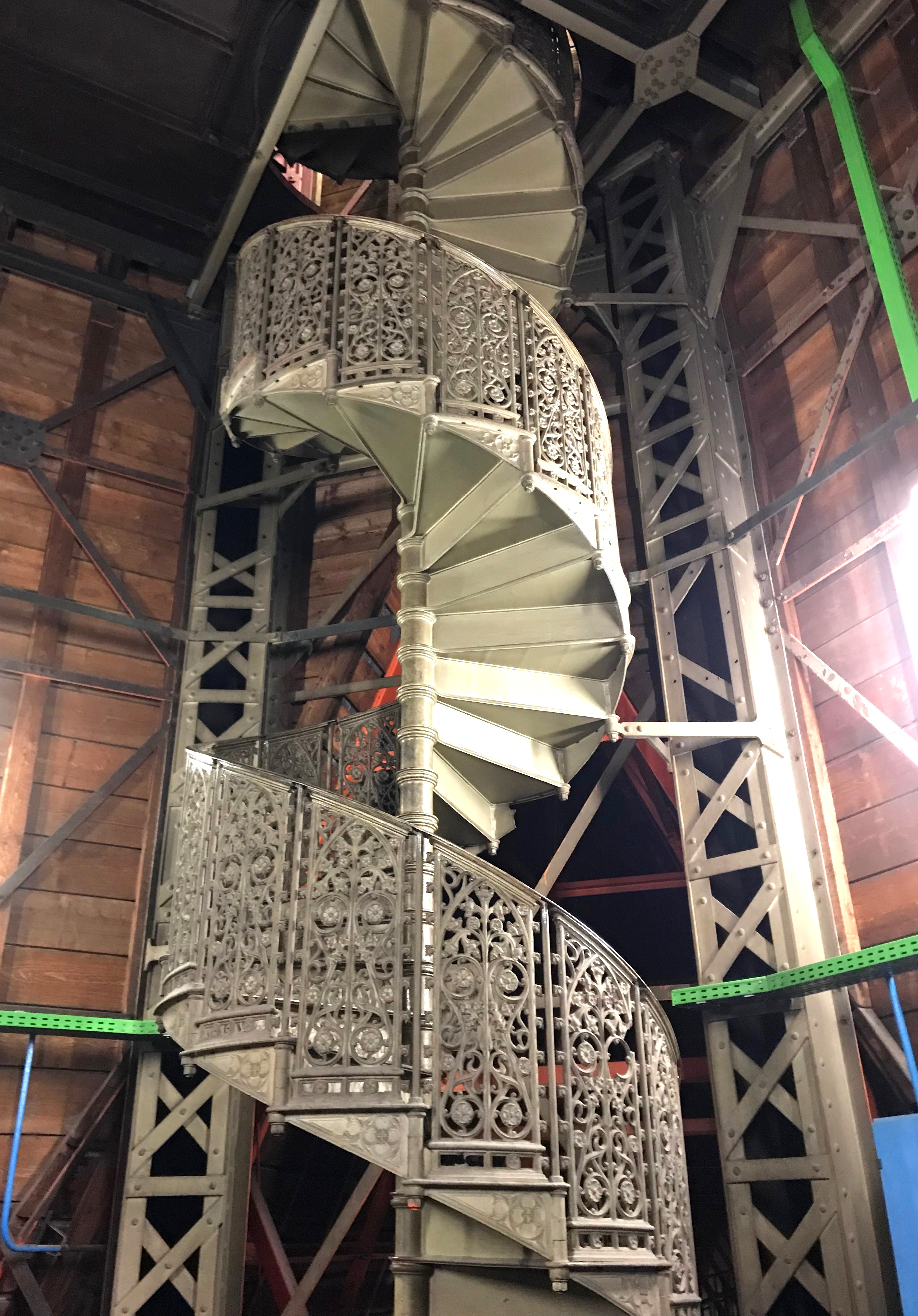 Treppe im Vierungsturm des Kölner Domes